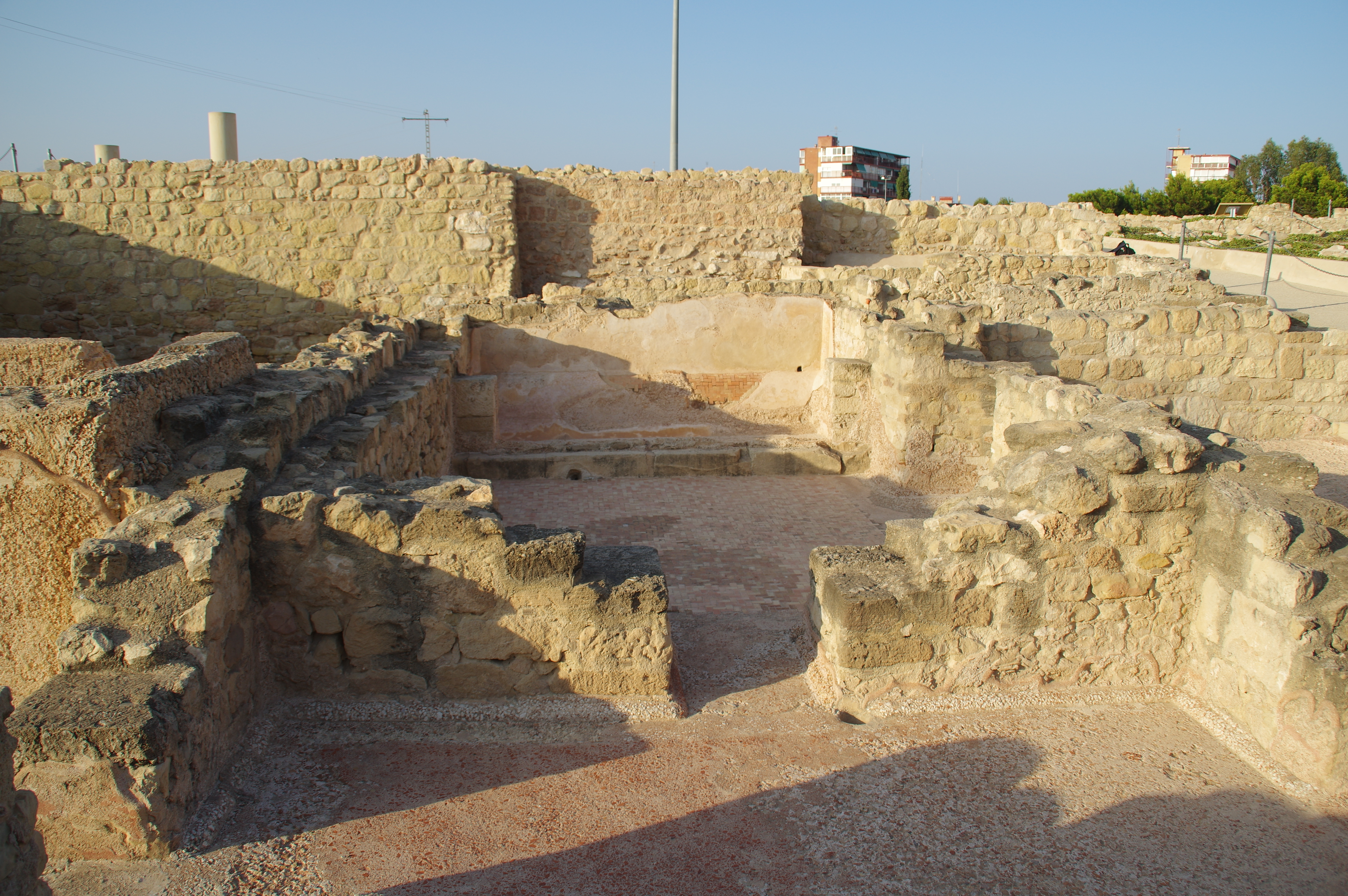 VIEW : ® 's / DigiGraf / Ð / ┼ : ALICANTE YACIMIENTO DE LUCENTUM _TERMAS DE POPILIO